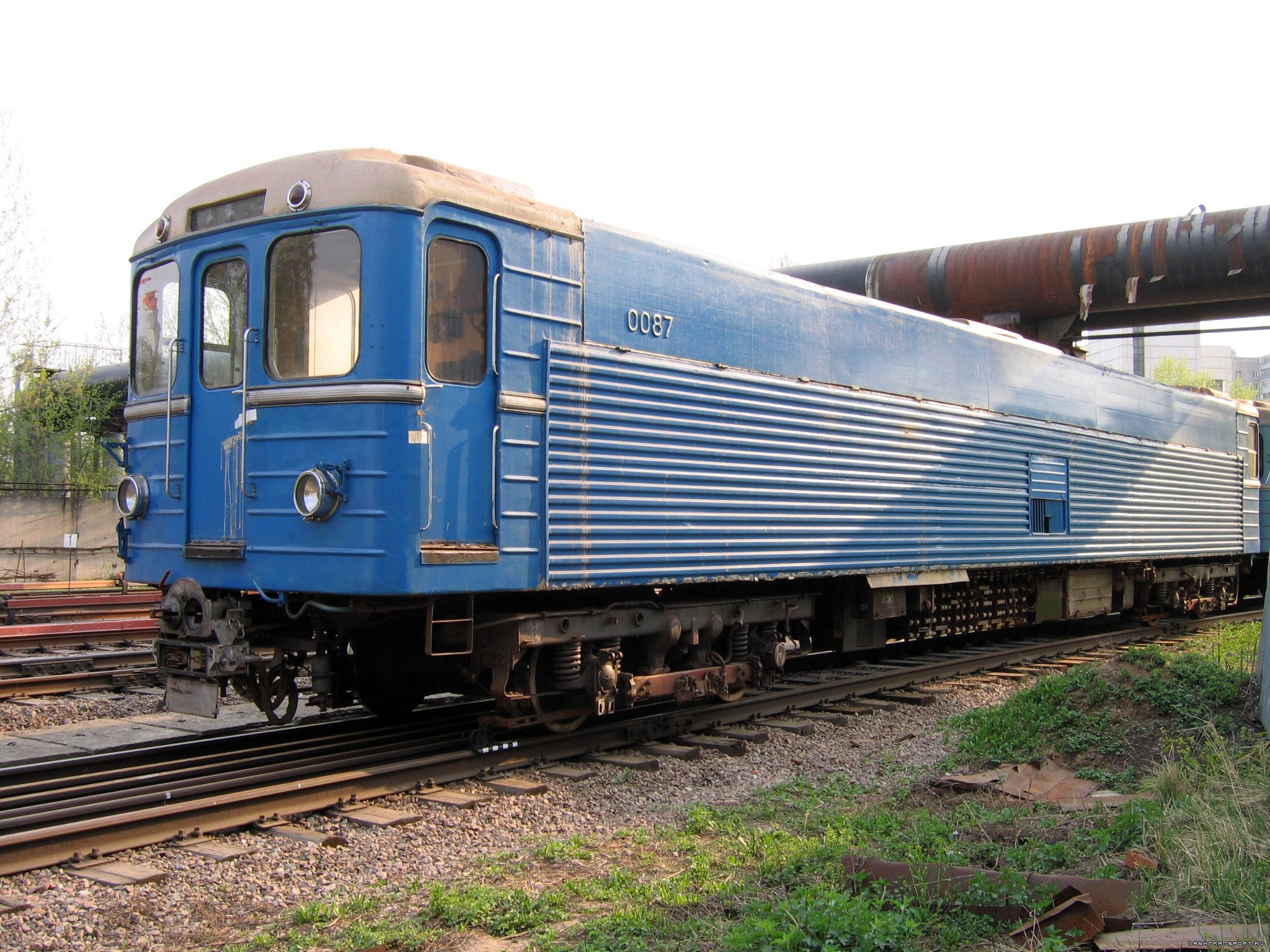 Вагон метро типа Л №0087 в электродепо Новогиреево. Эксплуатировался ранее на линии Д6 совместно с вагонами Еж6.